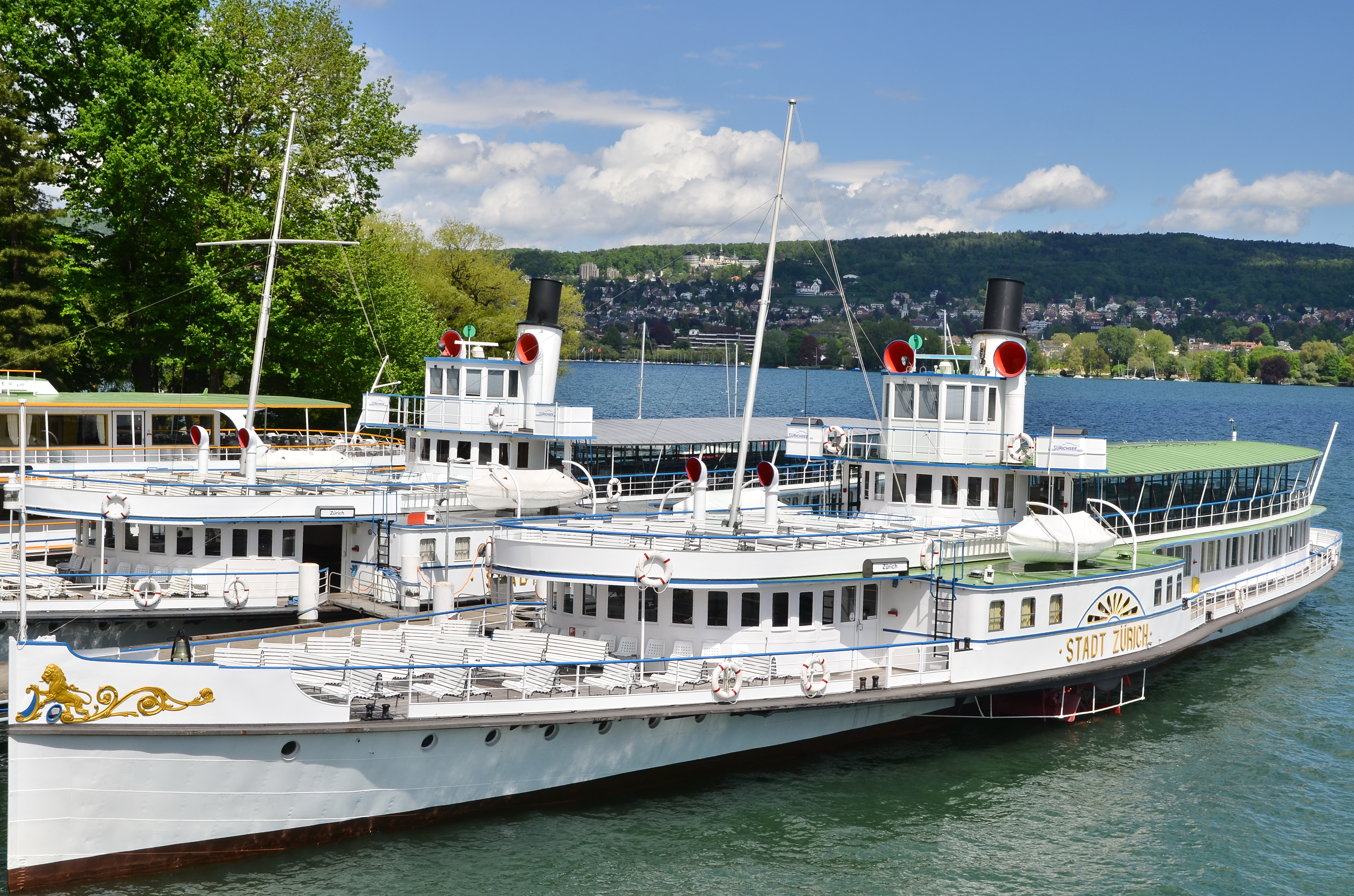 Paddle steamer Stadt Zürich at Zürichsee-Schiffahrtsgesellschaft (ZSG) shipyard in Zürich-Wollishofen (Switzerland)